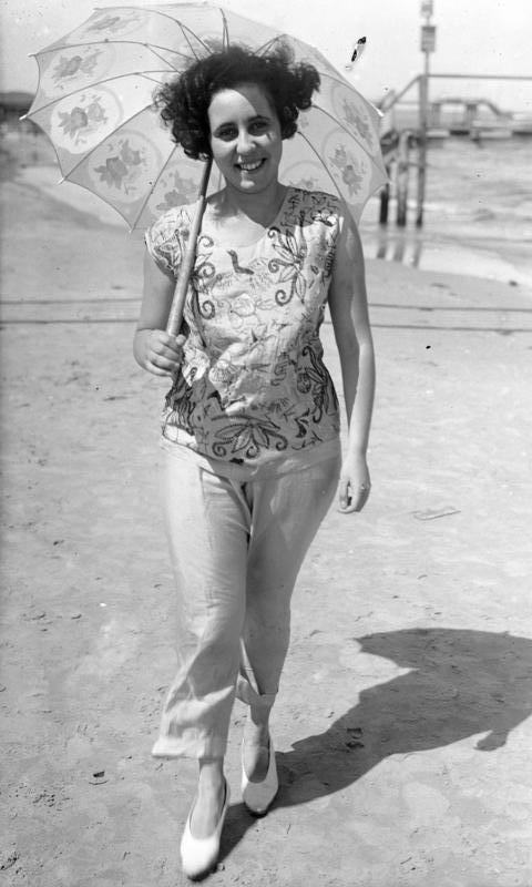 Ferienfreuden und Erholung am Strand der Ostsee ! Spaziergang im Pijama am Strand der Ostsee.